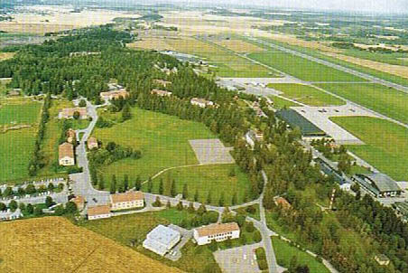 Vy mot norr av flygfältet. Kungliga Västmanlands Flygflottilj, F1.